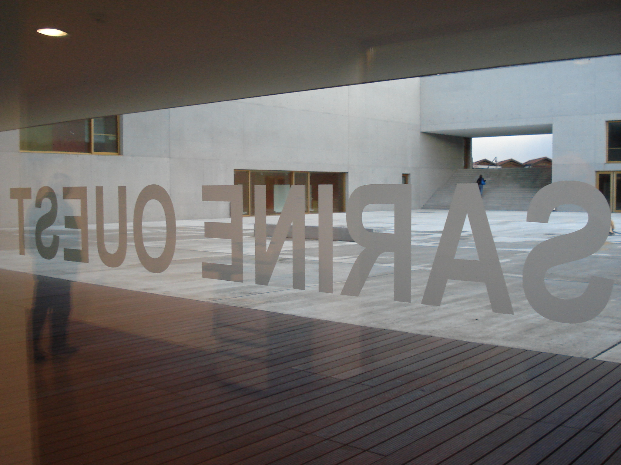 Vue du Cycle d'Orientation de Sarine-Ouest à Avry